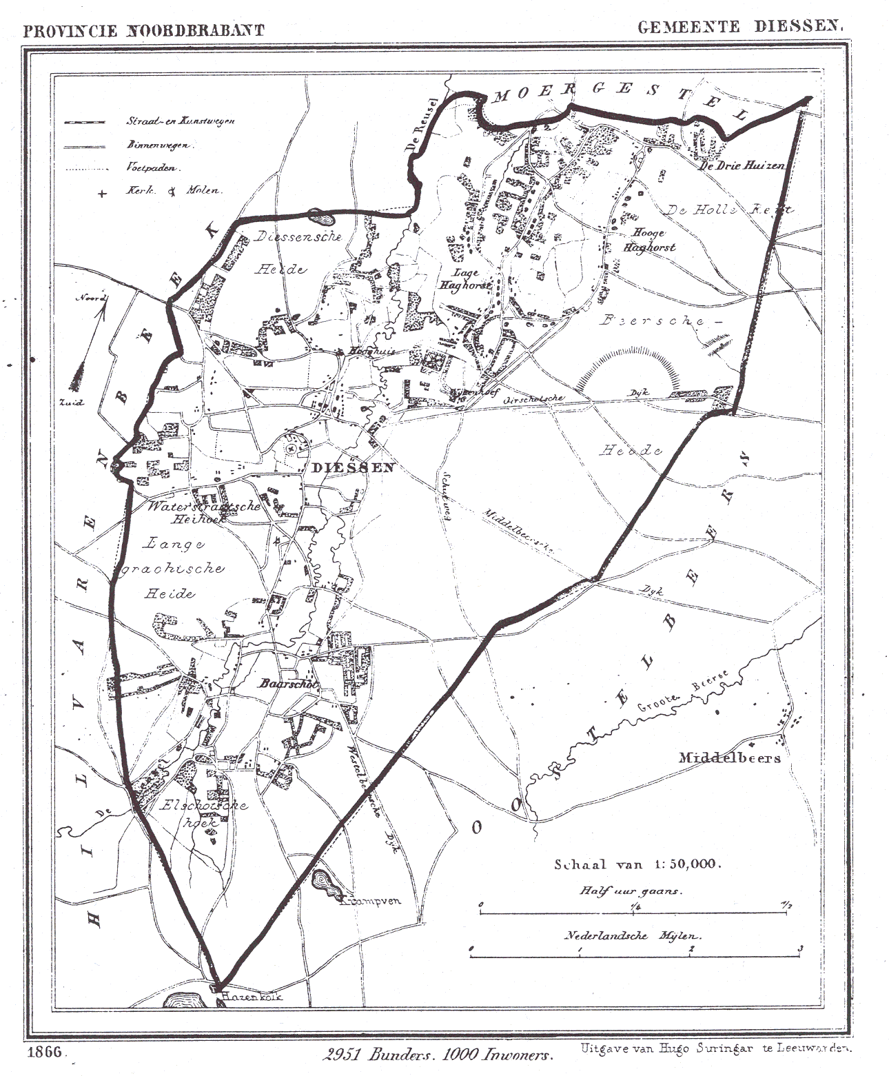 Nederland, Noord-Brabant, Gemeente Diessen